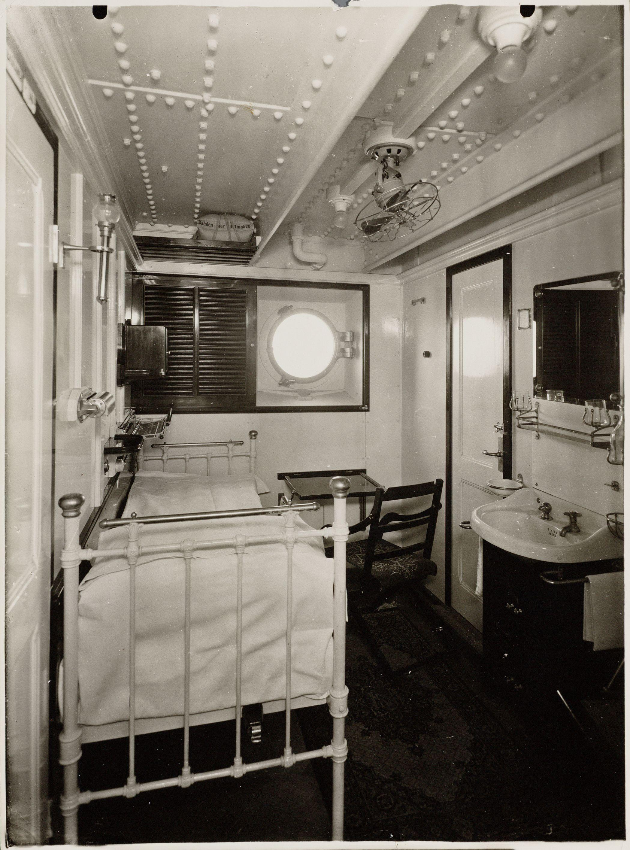 Beschrijving Eénpersoons hut tweede klasse aan boord van het mailschip ms. Christiaan Huygens Bouwnummer186, gebouwd op de werf van de Nederlandsche Scheepsbouw Maatschappij (N.S.M.) in opdracht van de Stoomvaart Maatschappij Nederland. Tijdens de Tweede Wereldoorlog werd het schip door de geallieerden als troepentransportschip ingezet. In de zomer van 1945 is het in Antwerpen gereviseerd. Op weg naar Rotterdam is het in het Steendiep op een mijn gelopen en zwaar beschadigd op de Steenbank gezet om zinken te voorkomen. Op 5 september 1945 brak het schip (op 51.37 noorderbreedte en 3.17 oosterlengte) en werden verdere bergingspogingen gestaakt. Documenttype foto Vervaardiger Onbekend Anoniem Collectie Archief Nederlandse Dok- en Scheepsbouw Mij.: foto's Datering 1928 Inventarissen Afbeeldingsbestand 010179000336